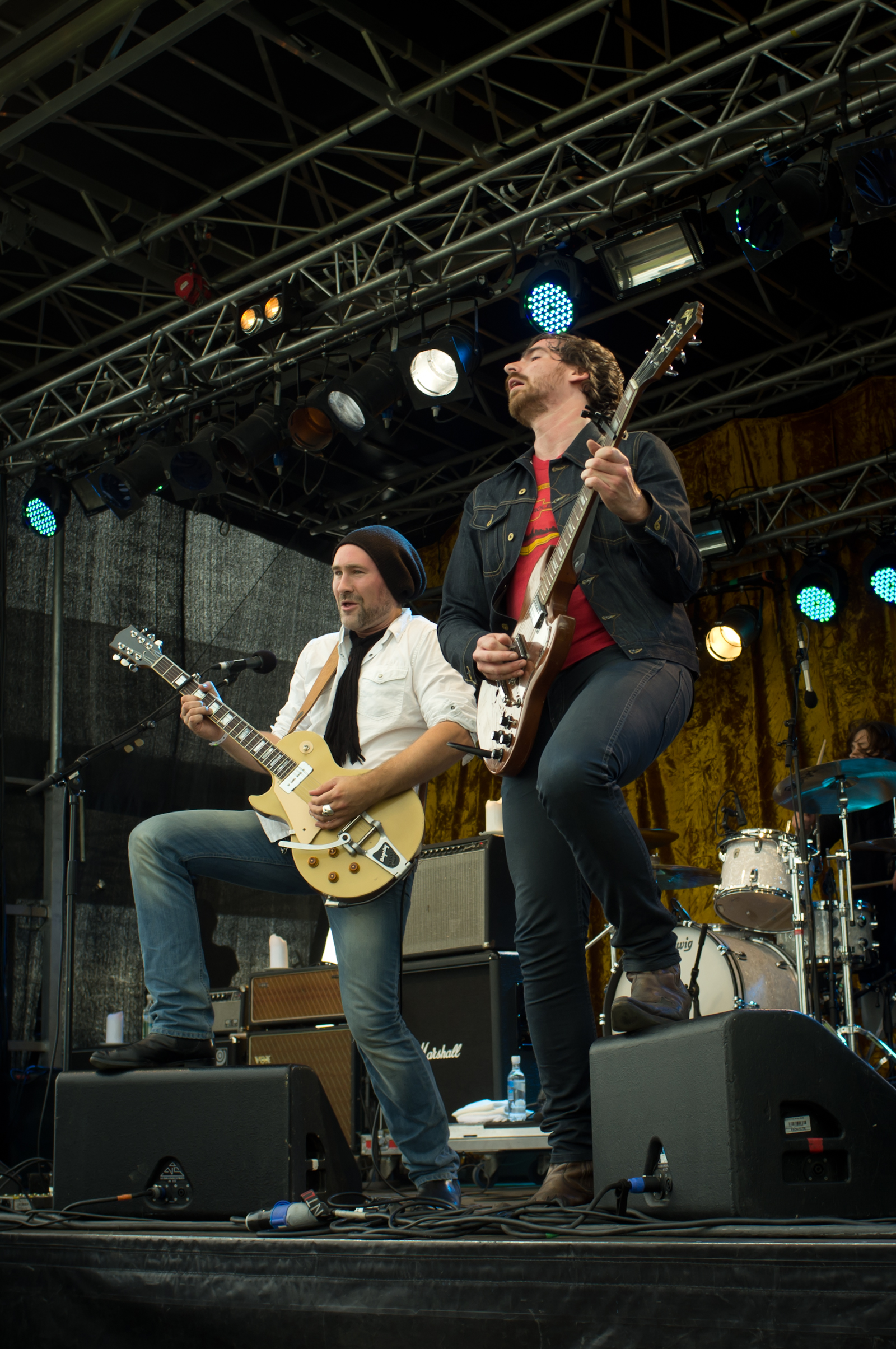 Slottsfjell 2012 - El Cuero